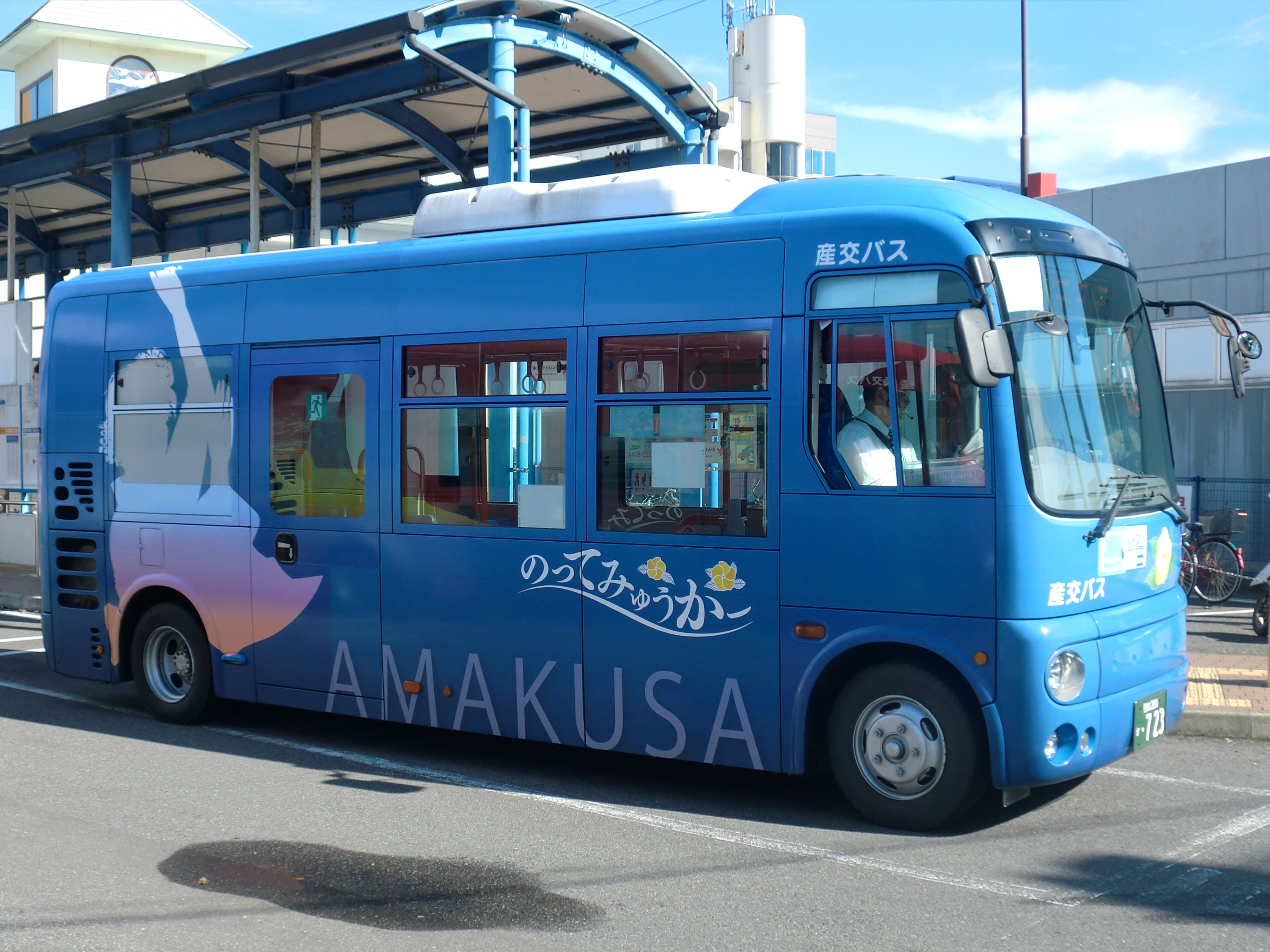 九州産交バス